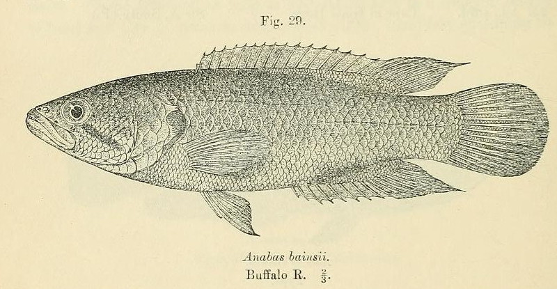 Sandelia bainsii